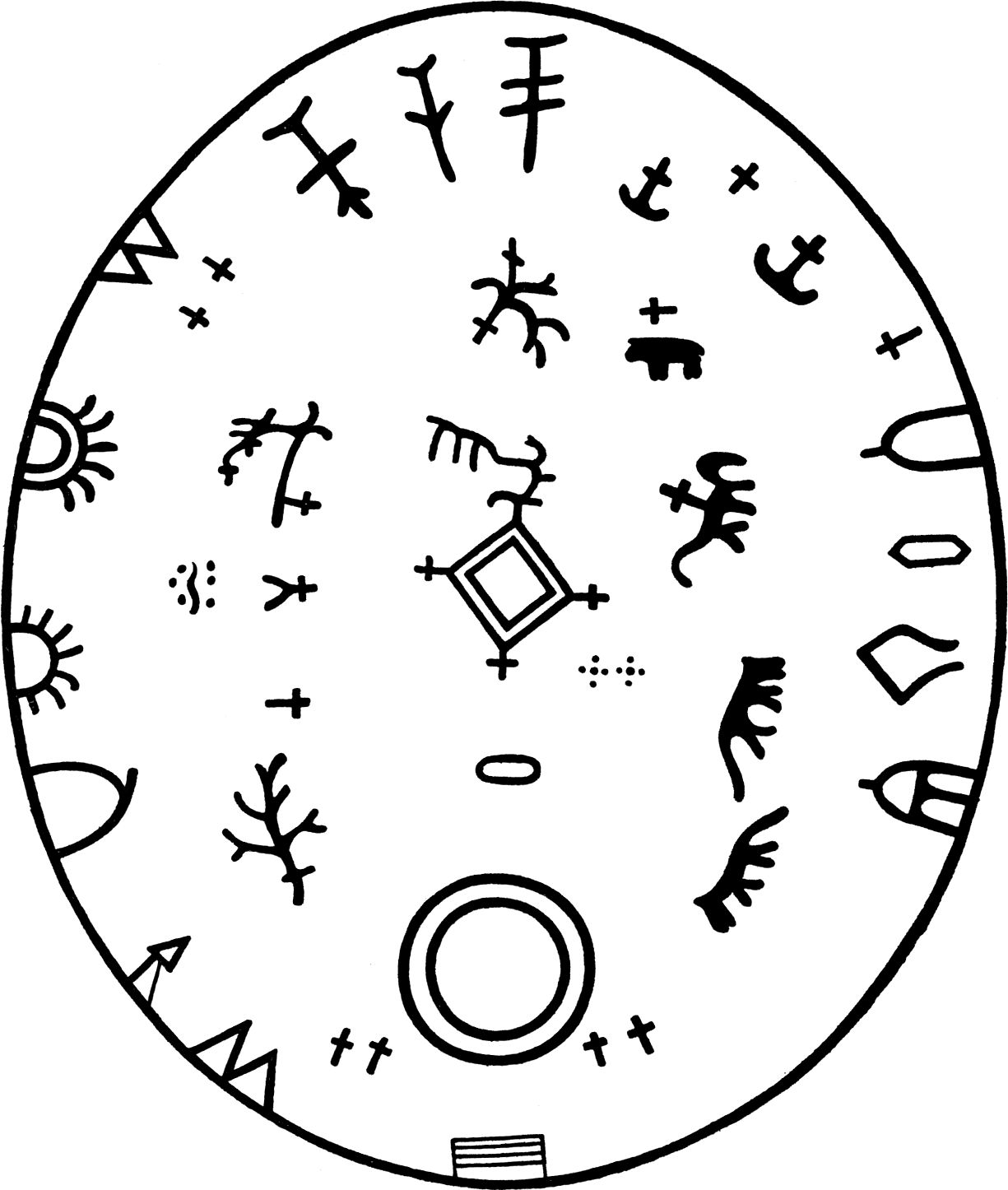 Bindalstromma; eEn samiska trumma eller nåjdtrumma (sydsamiska gievrie) från Bindal i Nordland, Norge. Innkjøpt 1925 til Etnografisk museum av Paul Egede Nissen fra Nils Vesterfjell. Litteratur: Leif Pareli. «To kildeskrifter om Bindalstromma». Åarjel-Saemieh; Vol 10 (2010); Ivar Bjørklund. «Bindalstromma». Ottar; 1997; nr 4 (=217)